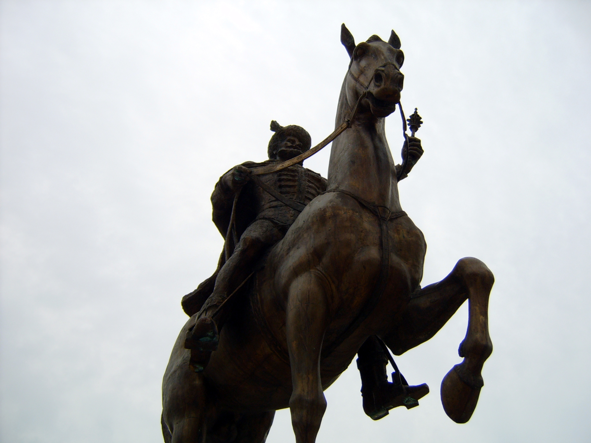 La statue de Mickaël 1er, roi de Roumanie (Mihail I), sur la place centrale de Tirgoviste, en Roumanie.